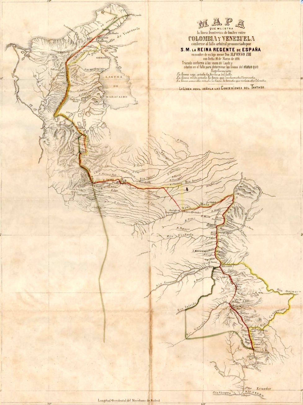 Mapa que muestra la línea fronteriza de límites entre Colombia y Venezuela conforme al fallo arbitral pronunciado por S.M. la reina regente de España